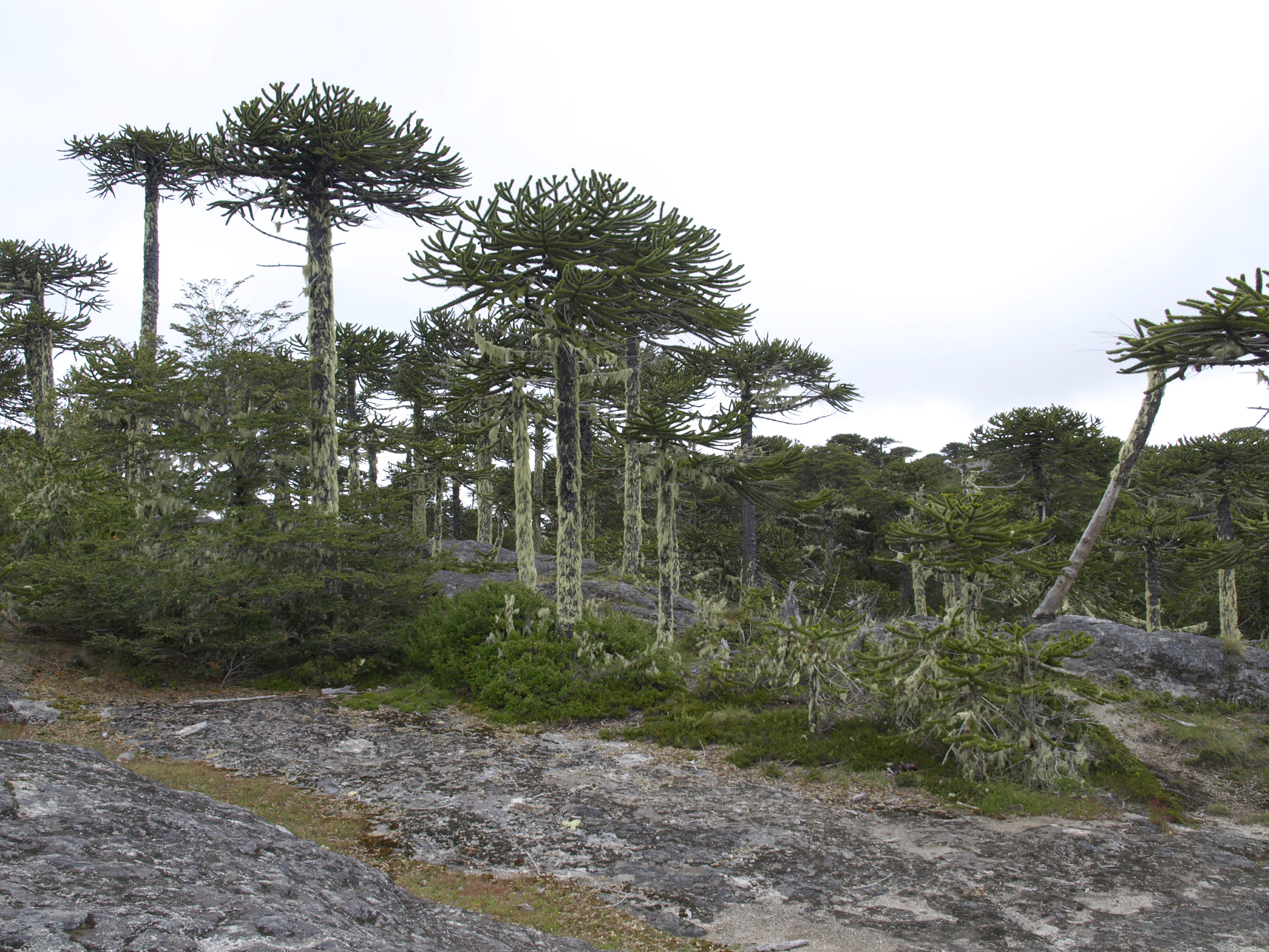 Bosque de Araucaria araucana, Piedra del Aguila, Parque Nacional Nahuelbuta, Chile.